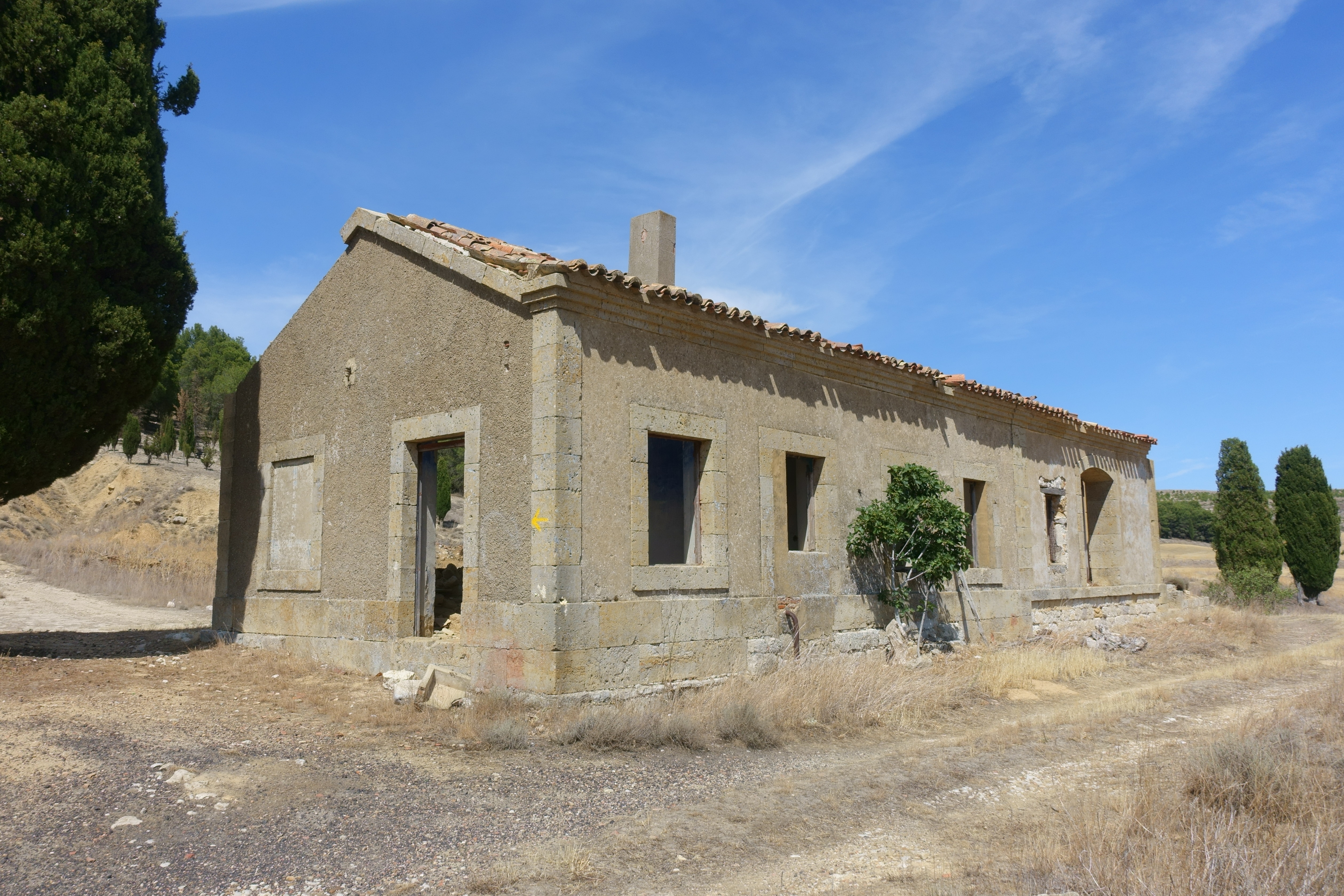 Antigua estación de ferrocarril de Valverde de Campos (Valladolid, España).